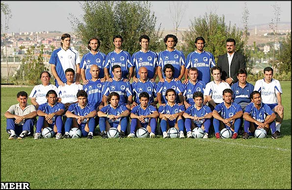 اردوی تدارکاتی تیم فوتبال استقلال تهران در آنکارا ترکیه در مرداد ۱۳۸۴